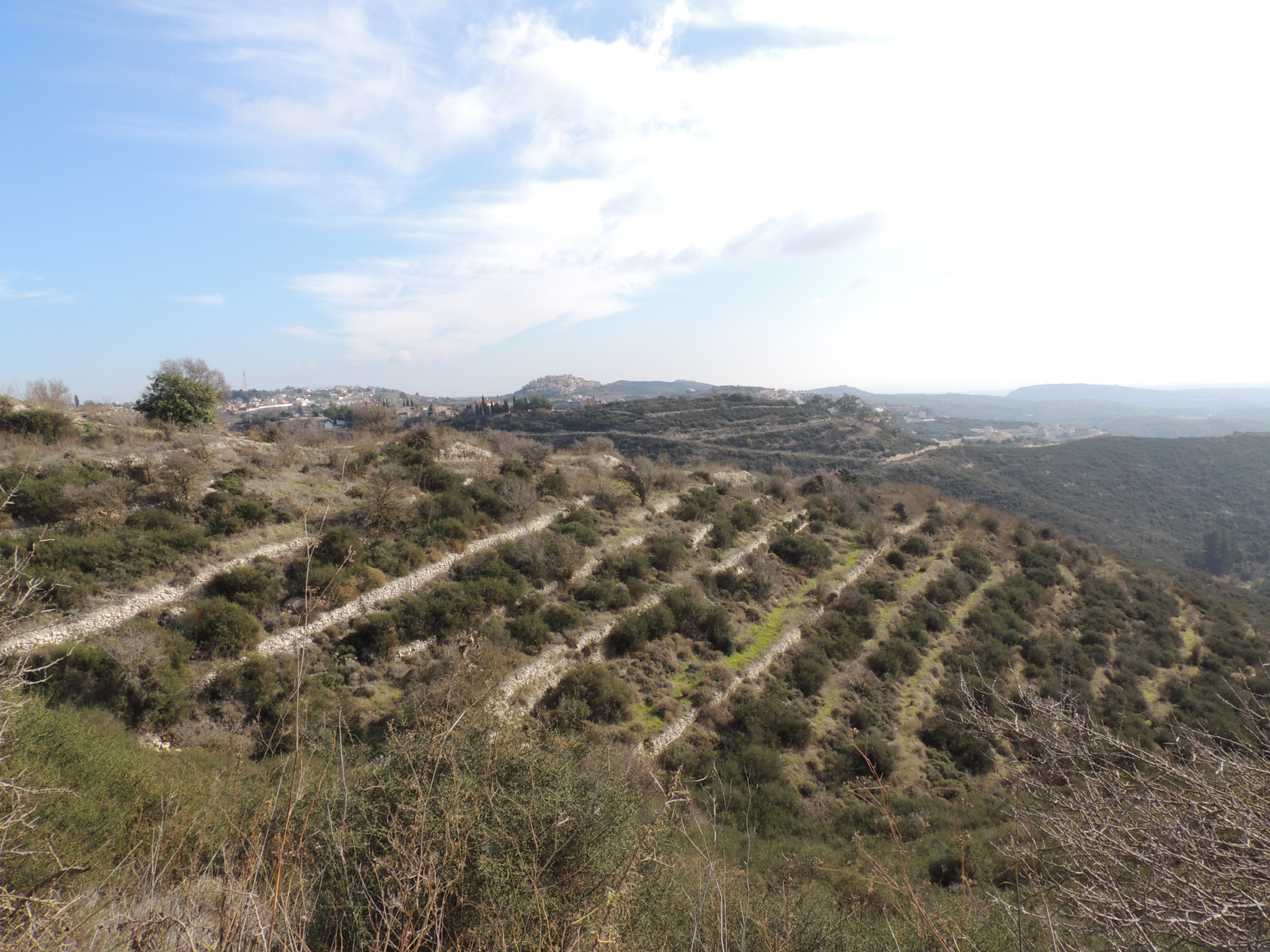 Tsada, Cyprus